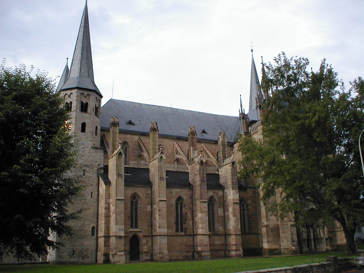 Südliche Ansicht Stiftskirche St. Peter, Bad Wimpfen